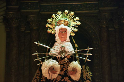 Imagen de la Virgen de los Dolores de Lleida.